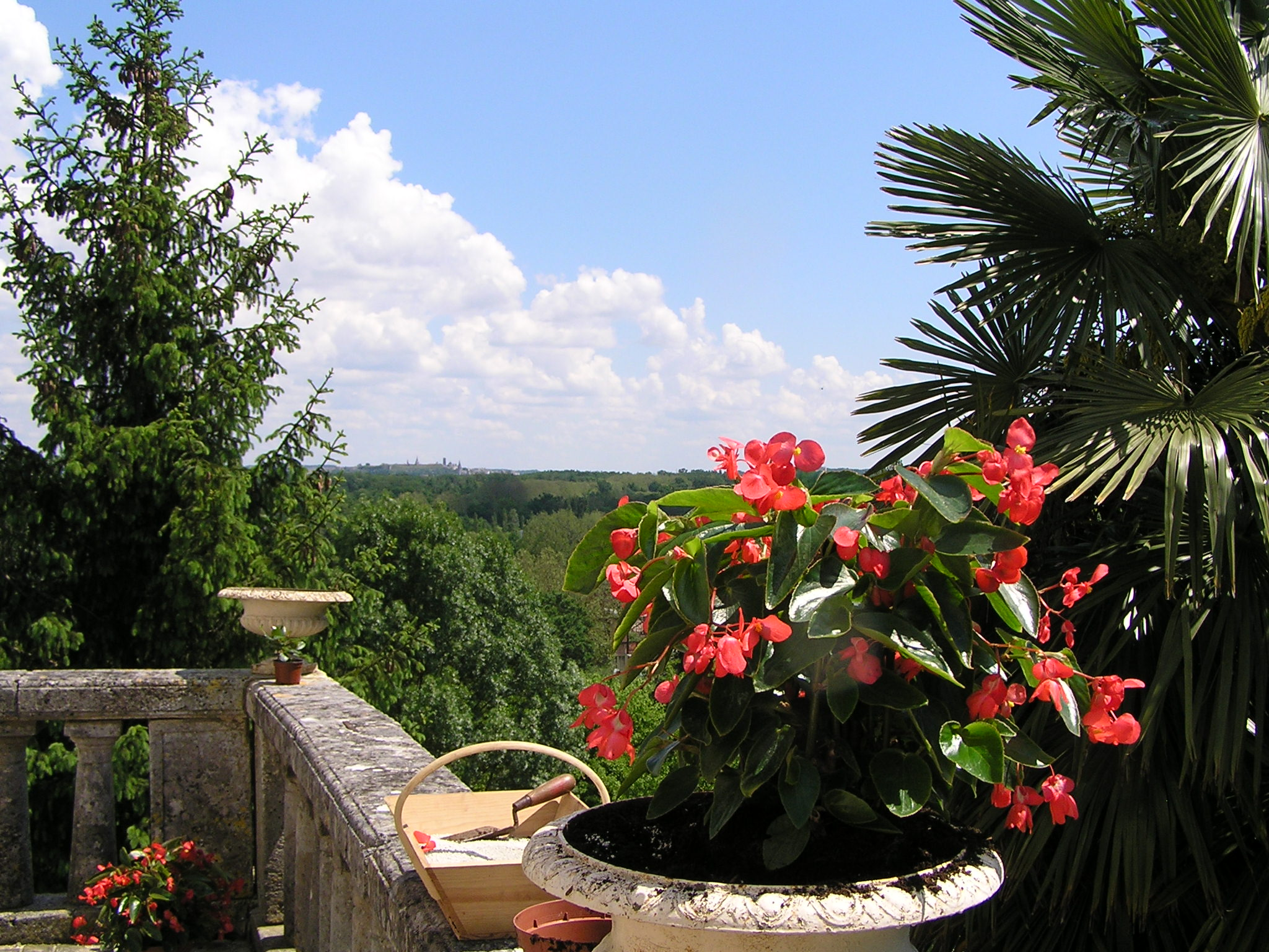 Vue des jardins depuis la mairie de Fléac